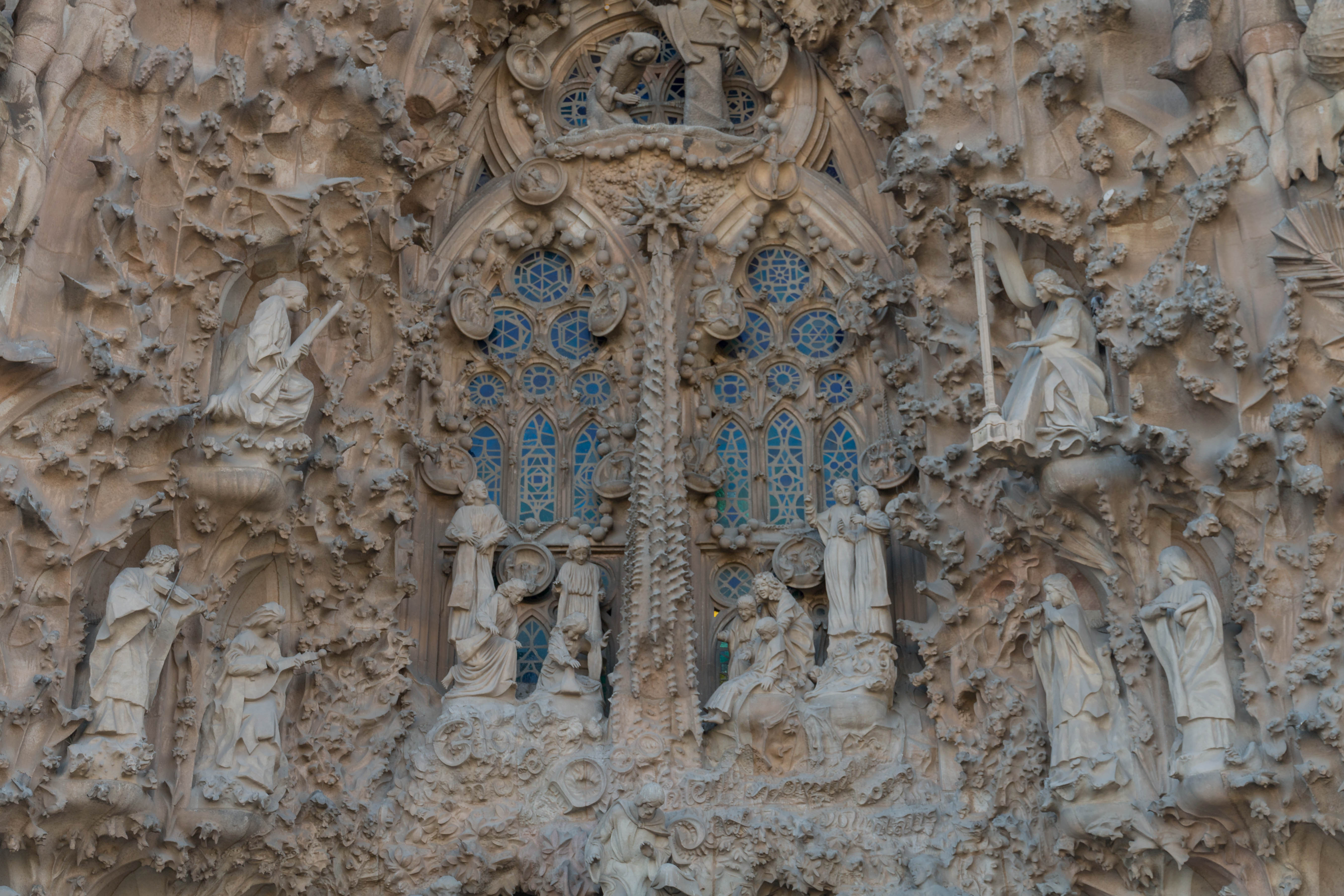 Die Geburtsfassade der Sagrada Familia im Detail